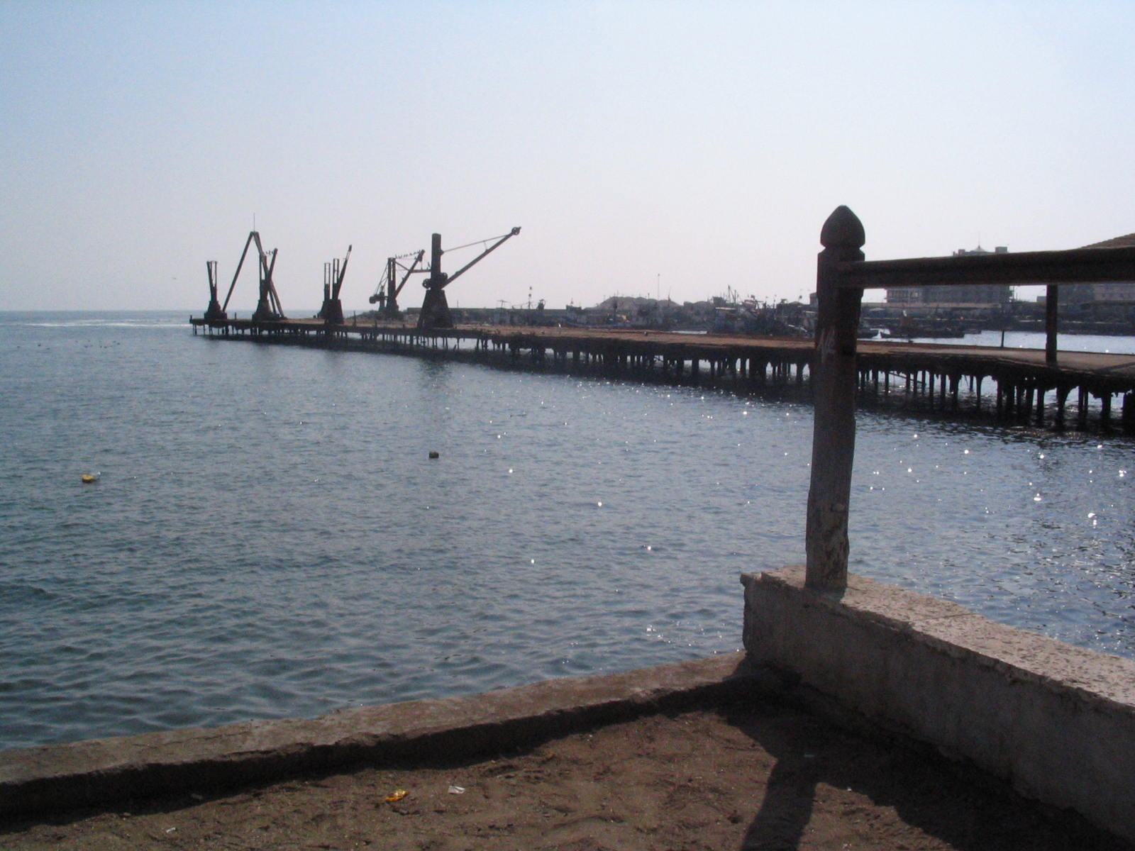 Muelle Salitrero Compañía Melbourne Clark. Antofagasta, Chile.